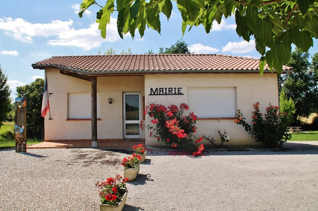 La Mairie